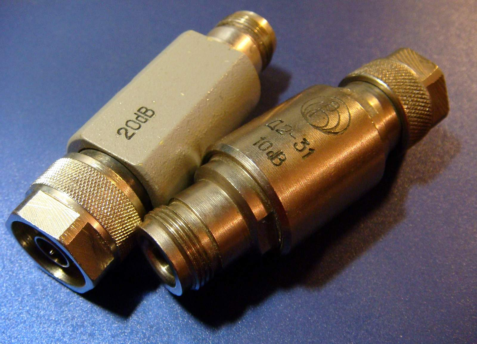 Аттенюаторы на 20 дБ и на 10 дБ для коаксиального тракта с каналом 7/3 мм ("экспертиза")